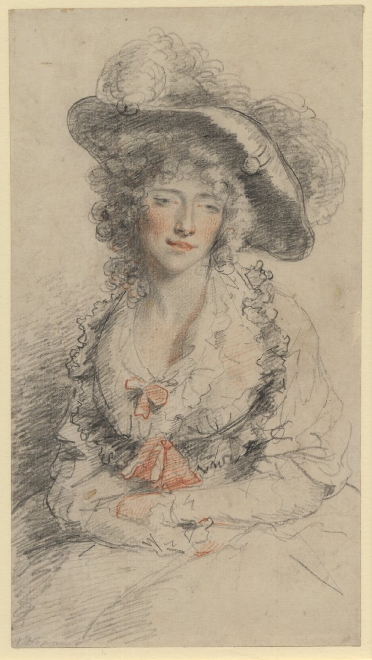 John Hoppner (1758–1810): Portrait einer Lady, wahrscheinlich Grace Dalrymple Elliott (ca. 1754–1823). Schwarze Kreide mit roter Kreide, 235 x 127 mm. British Museum.